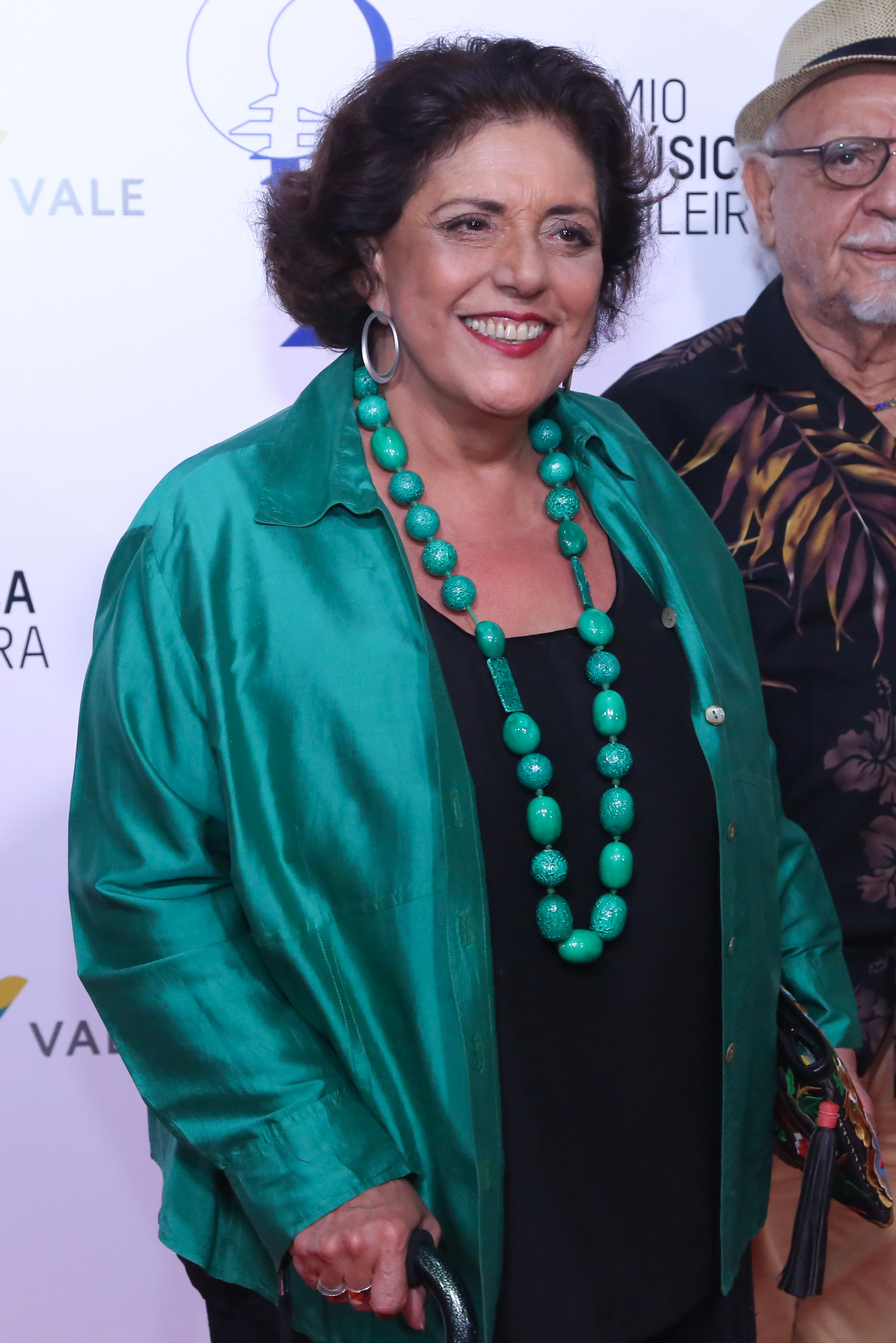 Leda Nagle - 26° Prêmio da Música Brasileira 2015, no Theatro Municipal, no Centro do Rio de Janeiro/RJ. (10/06/15) Foto: Roberto Filho/Divulgacão